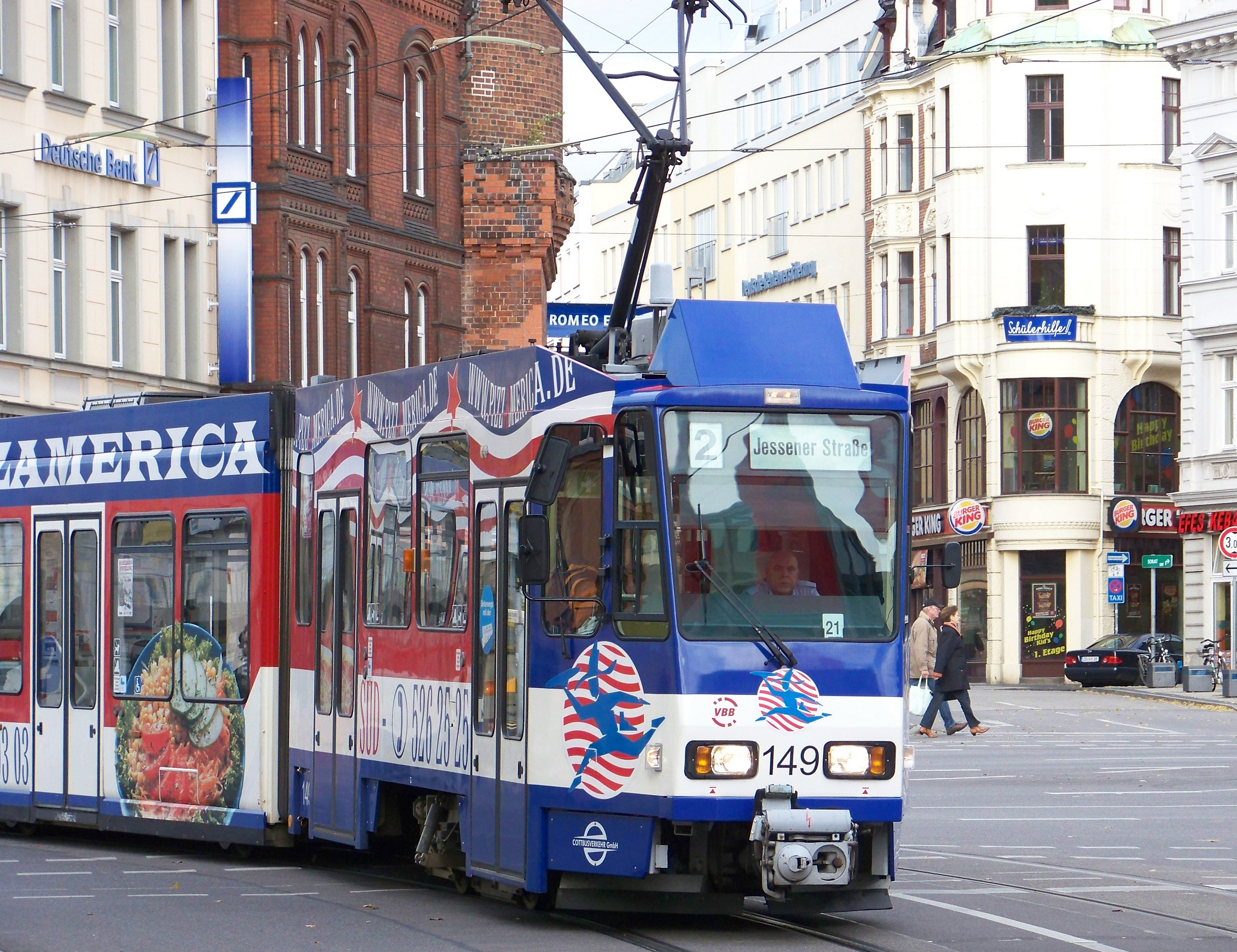 Straßenbahn der Linie 2 am Spremberger Turm Richtung Jessener Straße in Cottbus